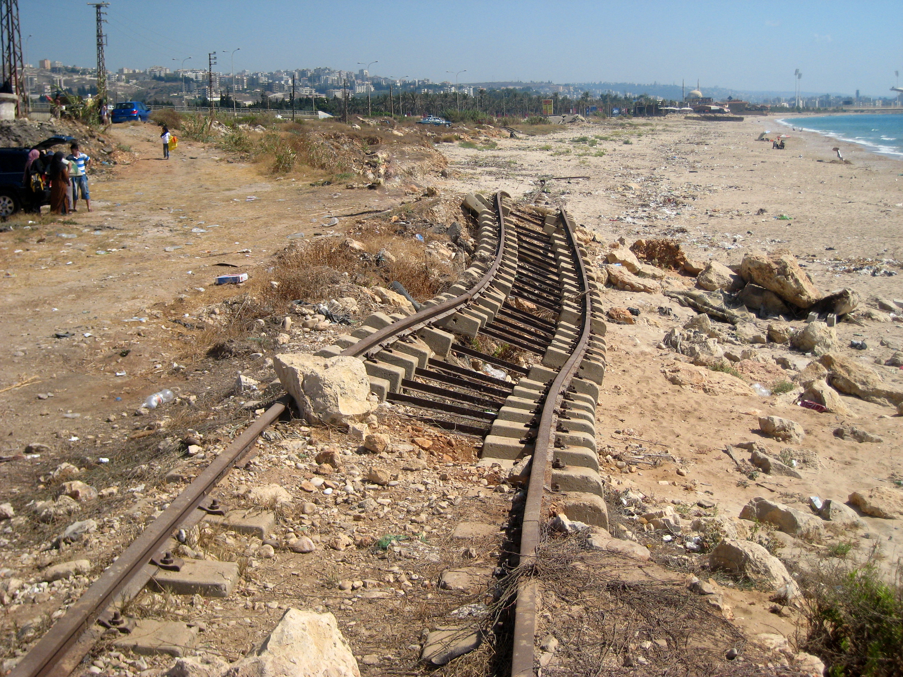 La voie ferrée emportée par la mer à Saïda (Liban)